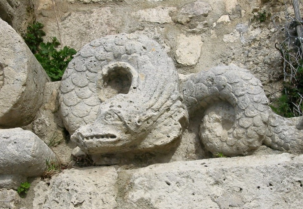 Scultura di una Biddrina (tre metri x 60-70 ), creatura acquatica dei racconti focloristici popolari, su una fontana nei pressi di Mussomeli (provincia di Caltanissetta, Sicilia)